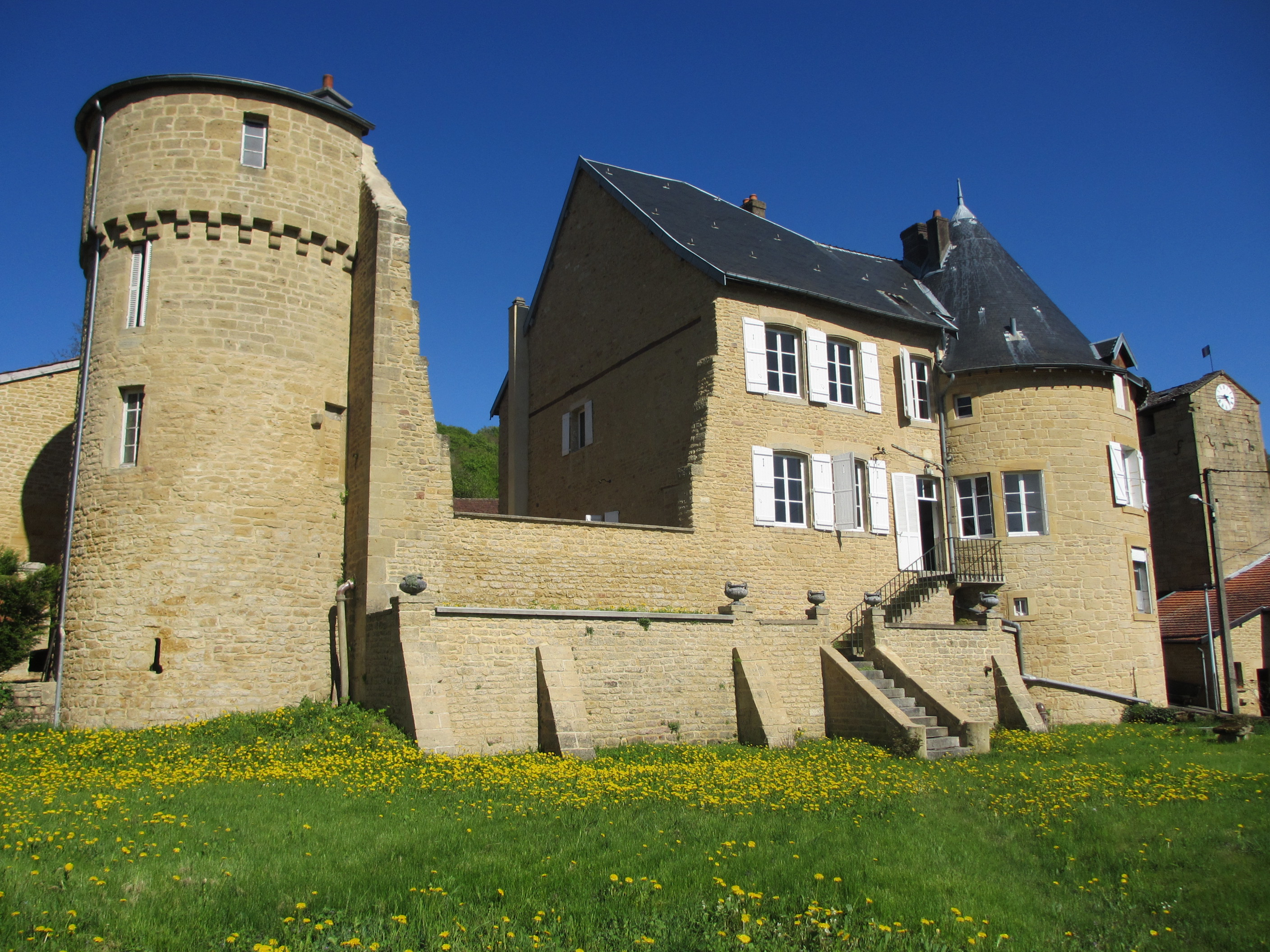 Château de Villette (54), vu du jardin, en 2013